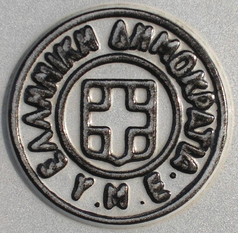 Наліпка номерного знаку